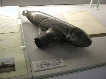 国立科学博物館に収蔵されている 萱場工業 ヘリプレーン1型 のために提供された石川島播磨工業のラムジェットエンジン (transalted as Ramjet engine of Ishikawajima Harima Industry, which was offered for the type 1 industrial helicopter industry built in the National Science Museum) However this is clearly NOT a ramjet as there is no air intake!! This is most probably a tip-burner from a similar gyrodyne, using compressed air from a fuselage mounted gas turbine compressor or burning fuel in a combustion chamber, but NOT from the Kayaba Heliplane, as described.